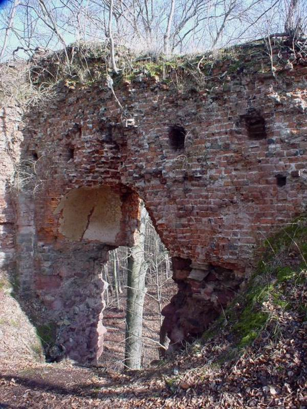 Grillenburg - Ruine des Palas